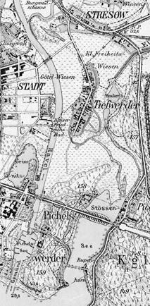 Village Tiefwerder around 1901. Today part of Berlin-Spandau, Germany. Part of: Charlottenburg, Maßstab 1:25.000. Königlich-Preußische Landes-Aufnahme 1901. Herausgegeben 1903. Auflagendruck 1914.